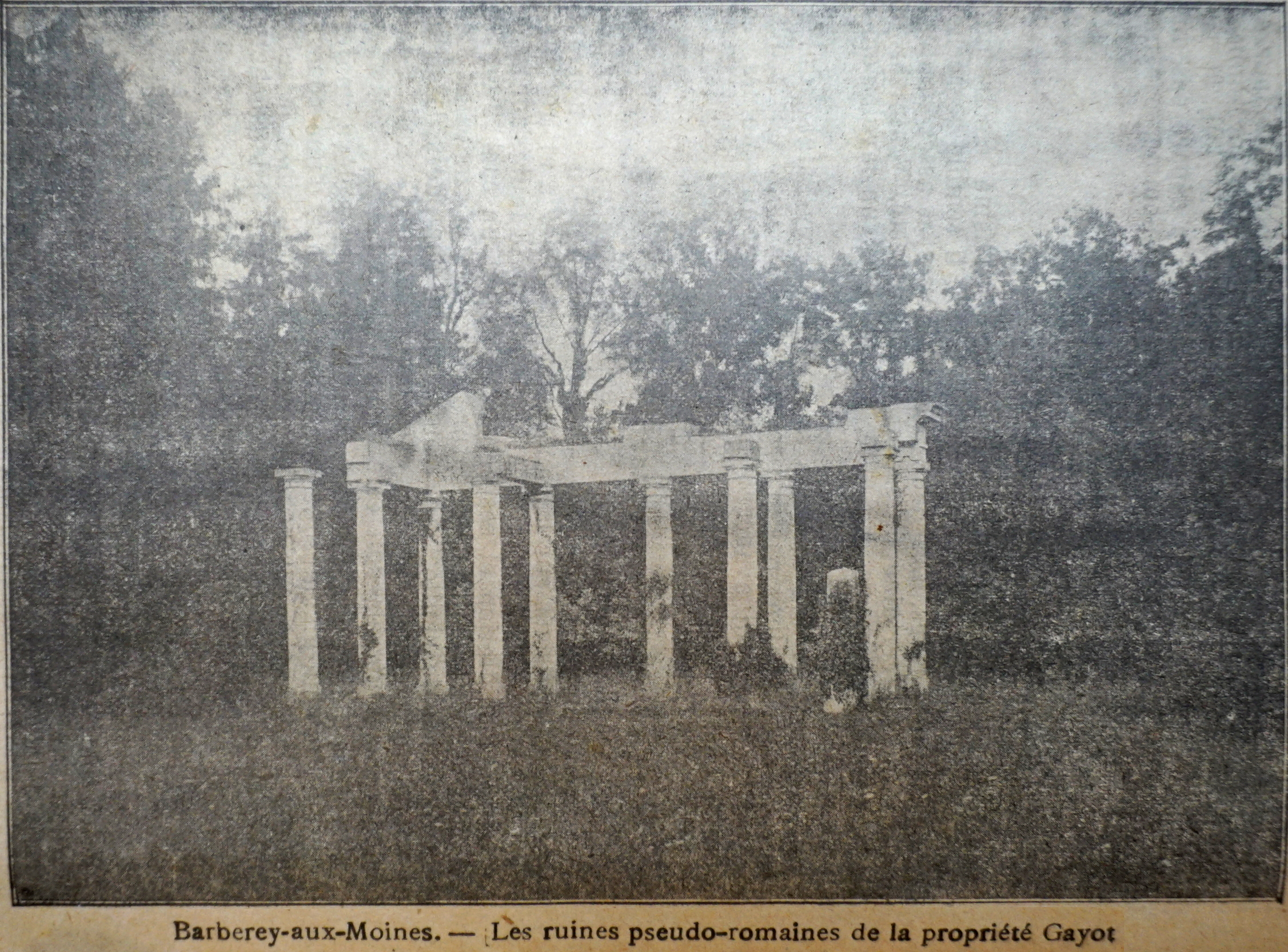 fausses ruines de la maison Guyot.